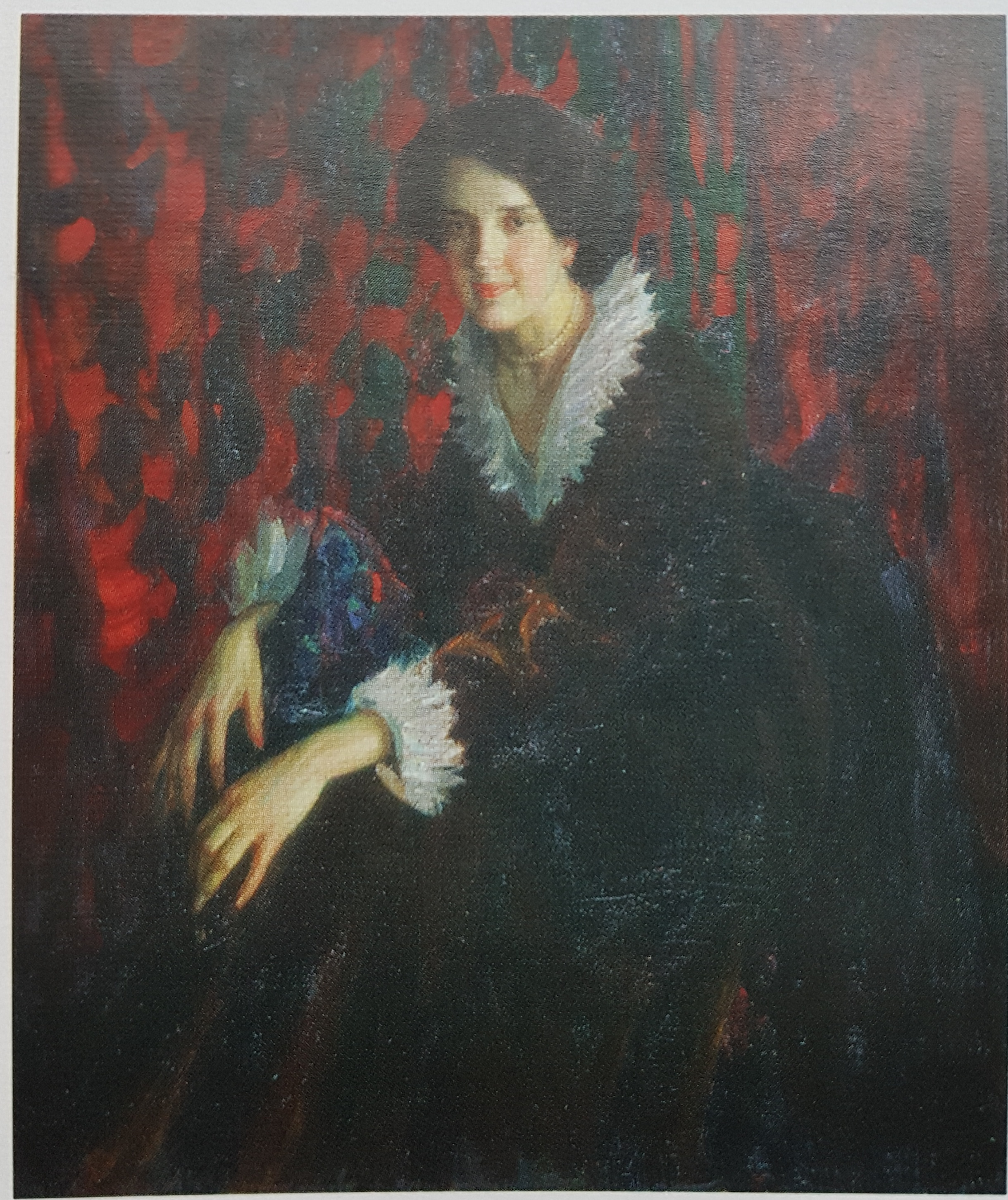 Portret Eugenii Sienkiewicz-Przyałgowskiej pędzla M. Siergejewa-Korobowa, Wileńska Galeria Malarstwa, Litwa